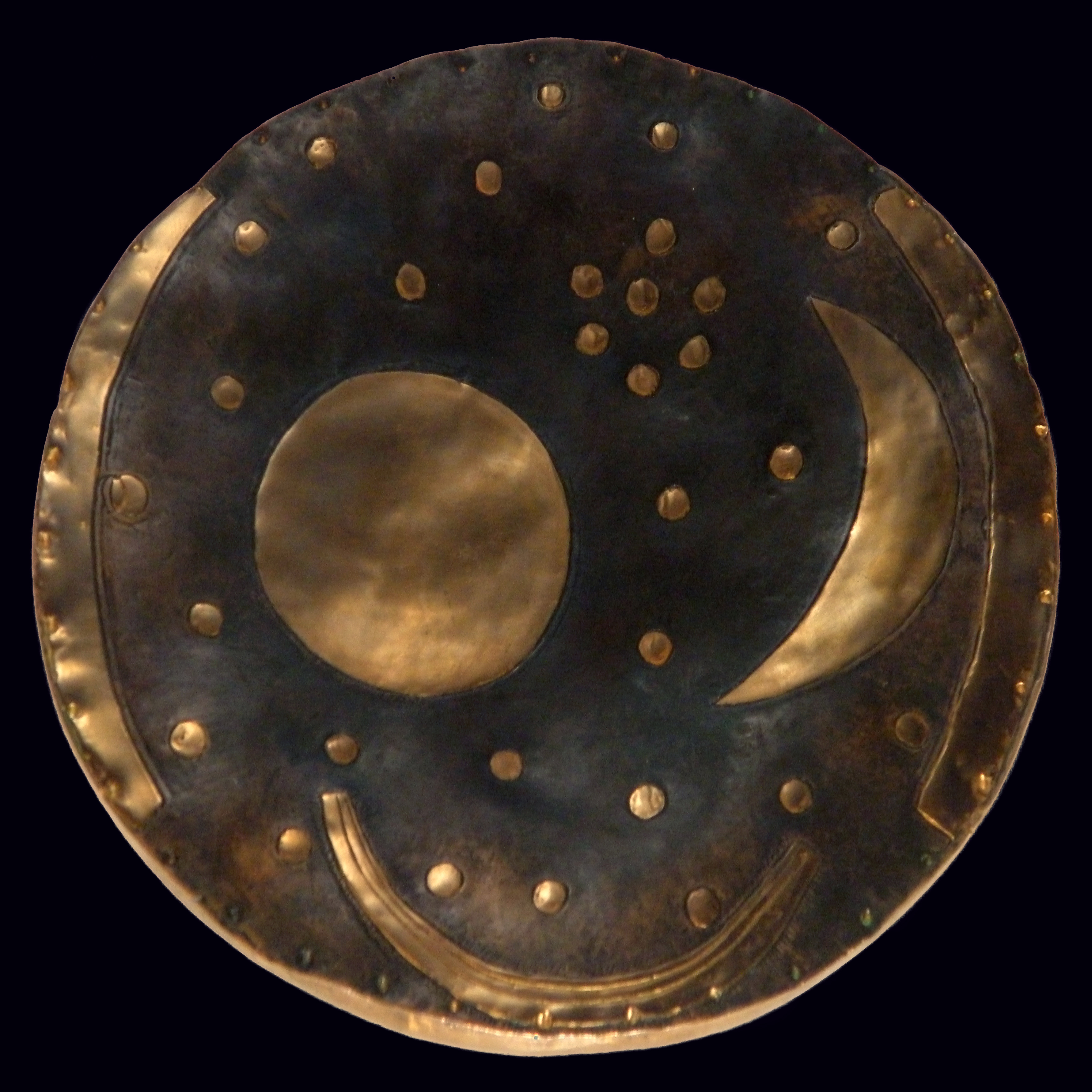 Rekonstruktion der Himmelsscheibe von Nebra